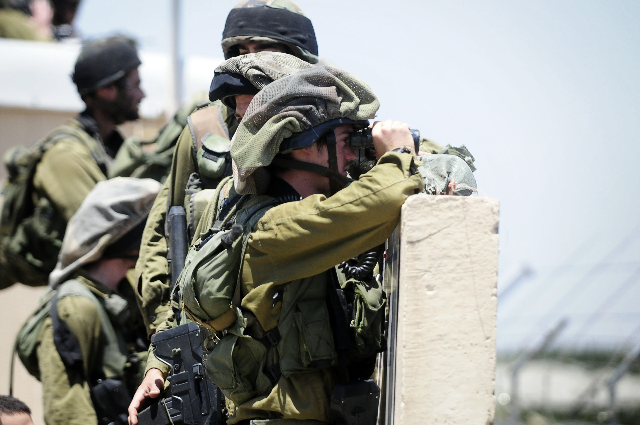 June 6, 2010 IDF soldiers near the Israel-Syrian border stand guard following the "Naksa Day" riots. חיילי צה"ל על גבול ישראל-סוריה יום אחרי מהומות "יום הנכסה".